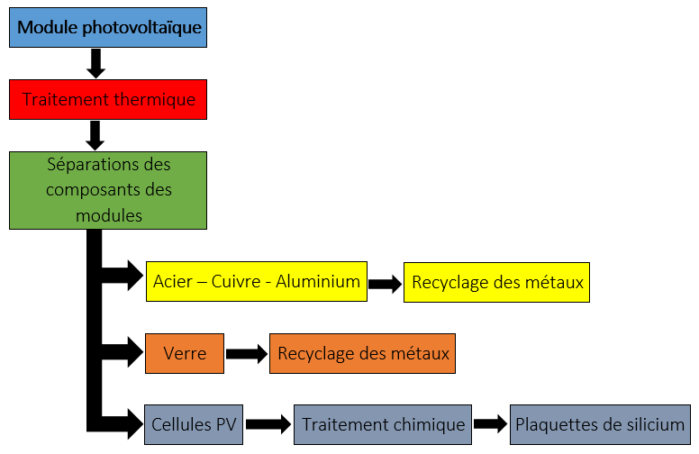 Ce figure résume les différents étapes du recyclage d'un panneau photovoltaïque.